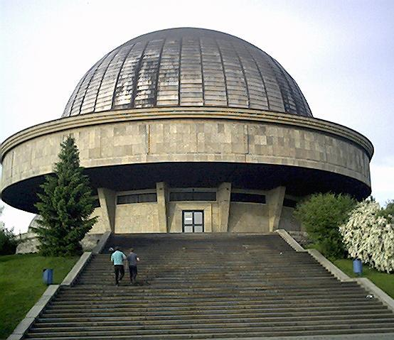 Planetarium Śląskie w Chorzowie